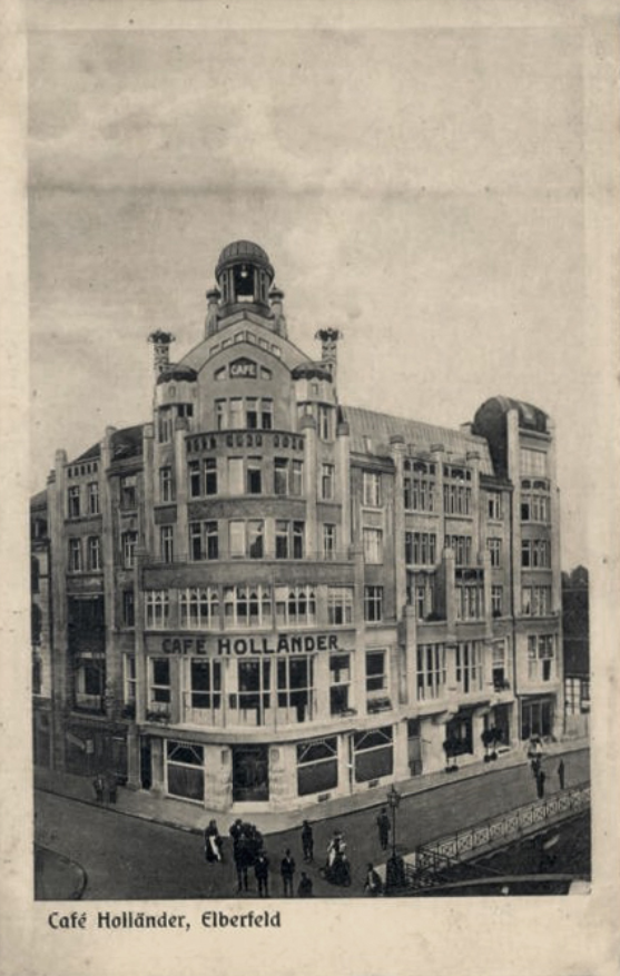 Café Holländer in Elberfeld, Postkarte